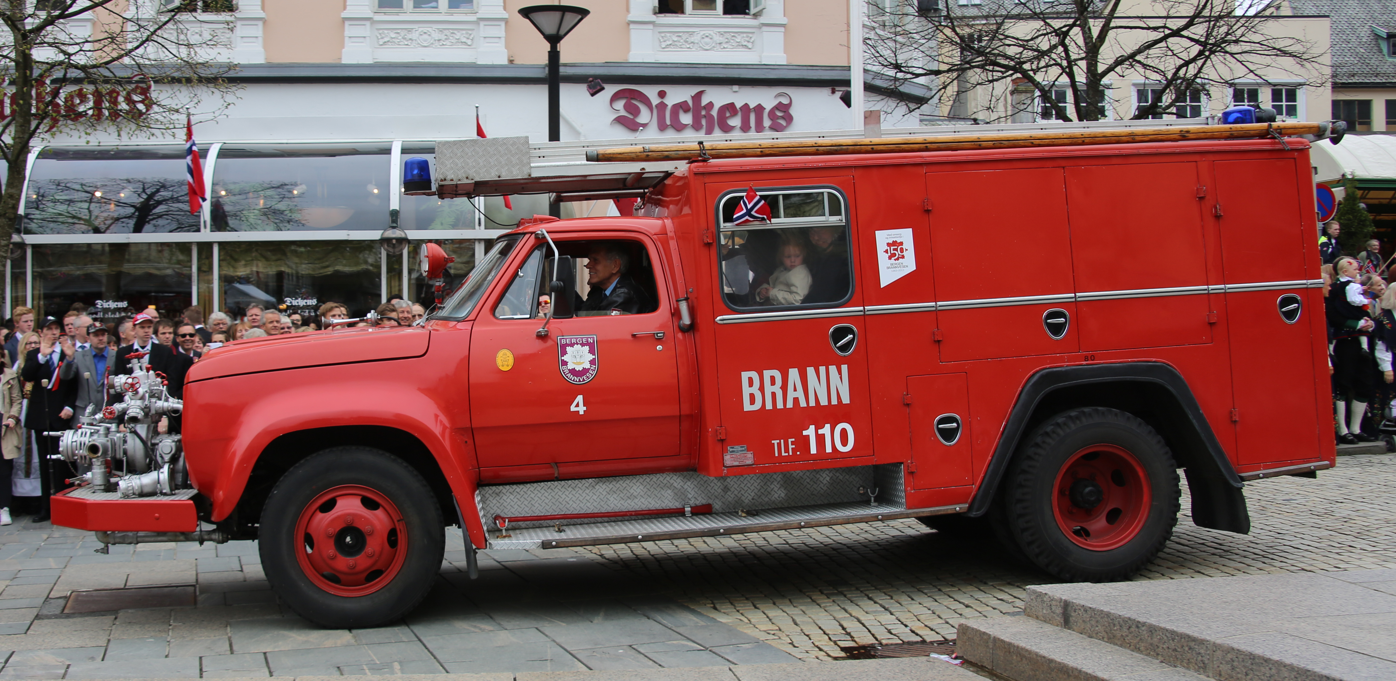 Bergen brannvesen